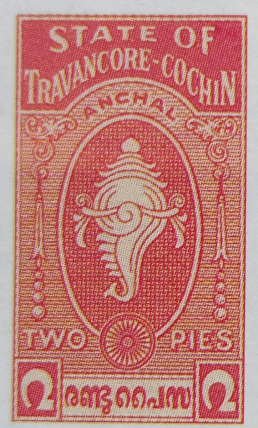 postal stamp